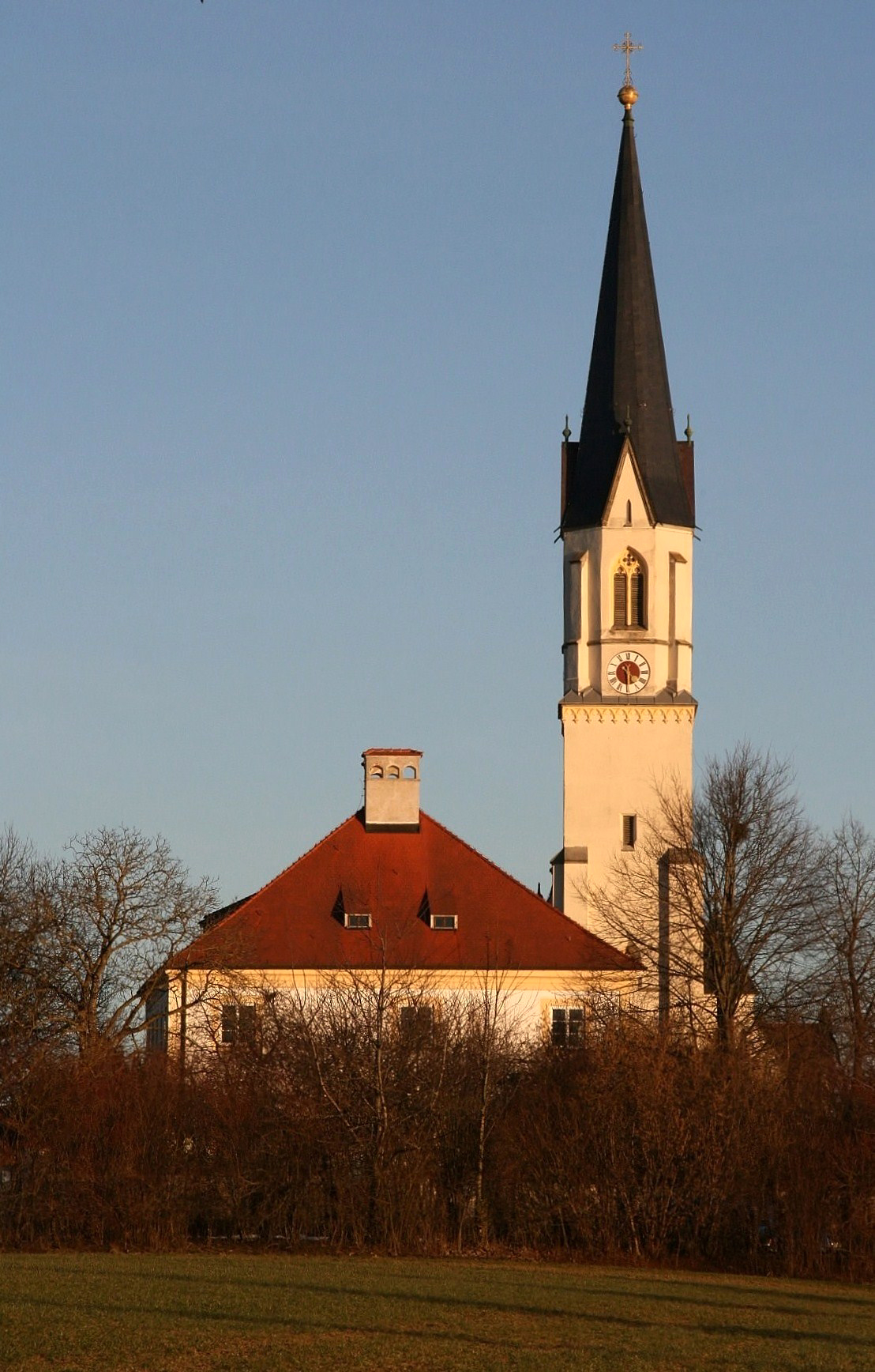 Der Turm der katholischen Pfarrkirche St. Blasius und das Pfarrhaus in Niederbergkirchen (Landkreis Mühldorf am Inn, Niederbayern). St. Blasius wurde als Nachfolger eines romanischen Baus zwischen 1467 und 1484 im spätgotischen Stil neu errichtet. Nach der Barockisierung 1715-32 wurde die Kirche 1883-93 im neugotischen Stil umgestaltet. Das Pfarrhaus zeigt barocke Gestaltung.